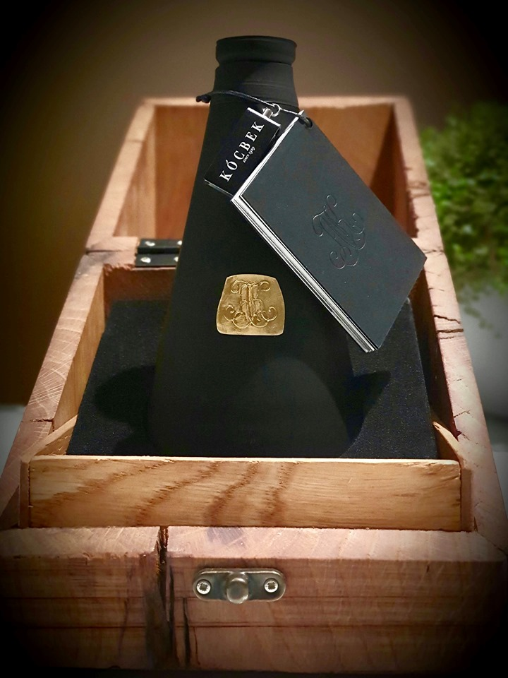 Izdelana v Sloveniji. Poimenovana Luxury Black Bottle